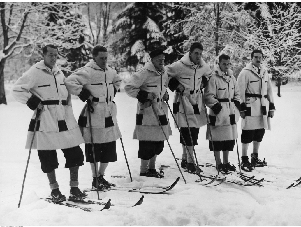 Jeux Olympiques d'hiver à Garmisch-Partenkirchen Skieurs canadiens: Harry Pangman, Bud Clark, Tom Mobraaten, Karl Baadsvik, Norman Gagne, William Ball (debout à gauche) lors de la formation.